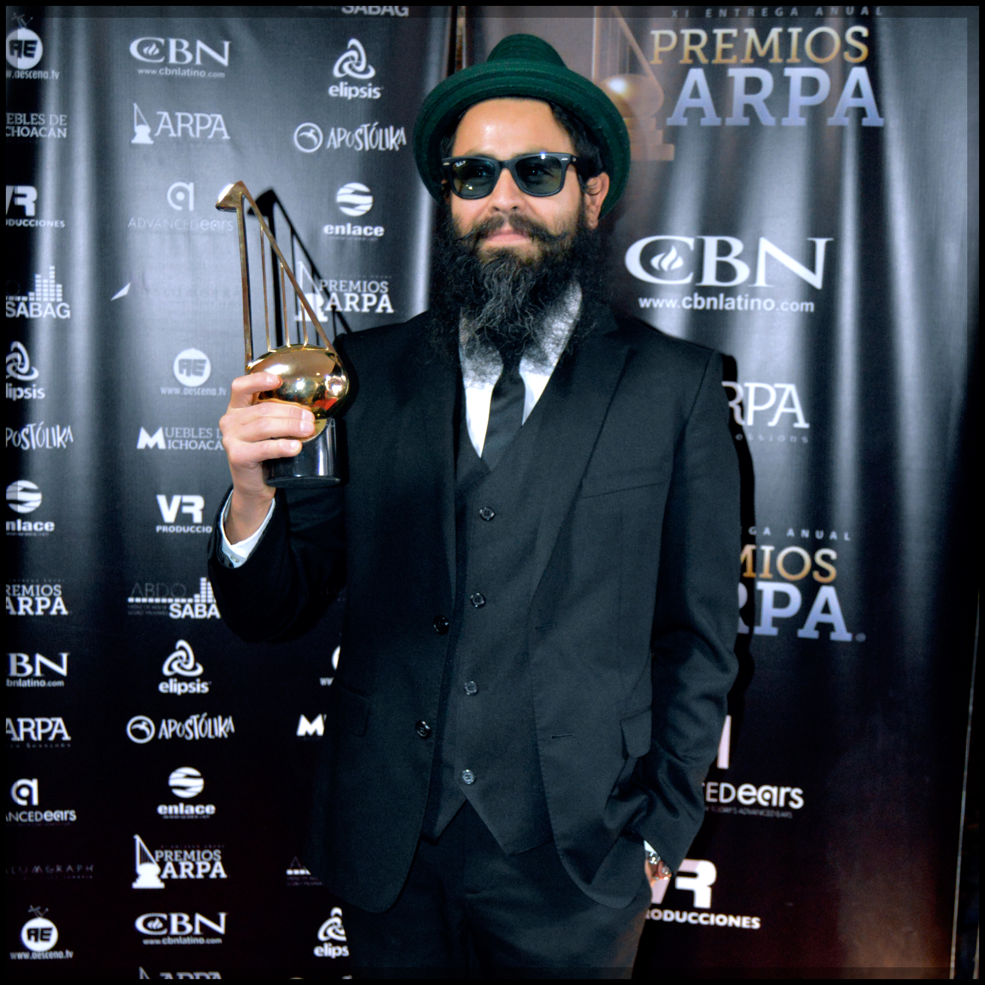 Miguel Balboa gana el Premio Arpa 2014 en la categoría Mejor Álbum de Cantautor.